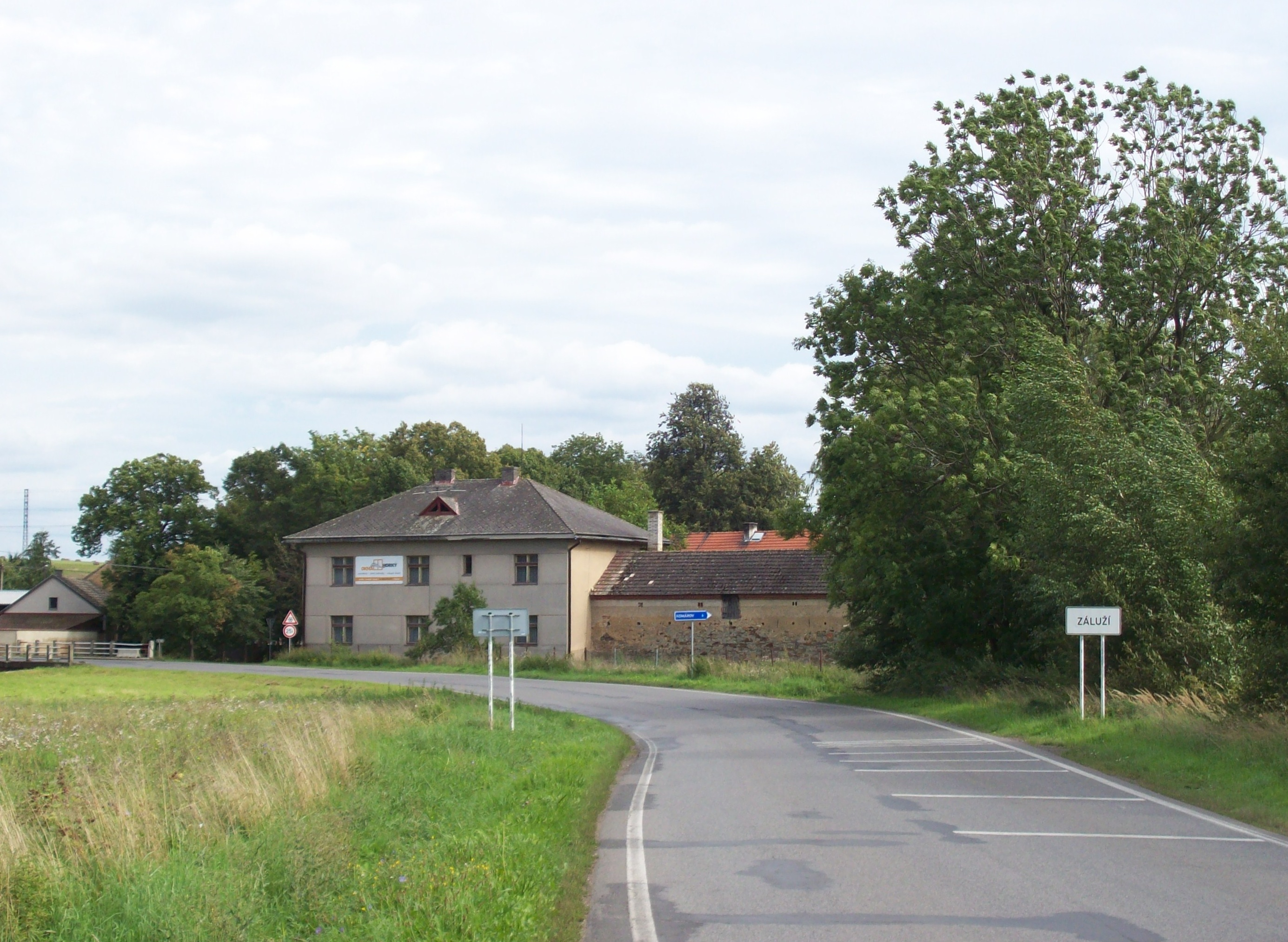 Záluží (okres Beroun)